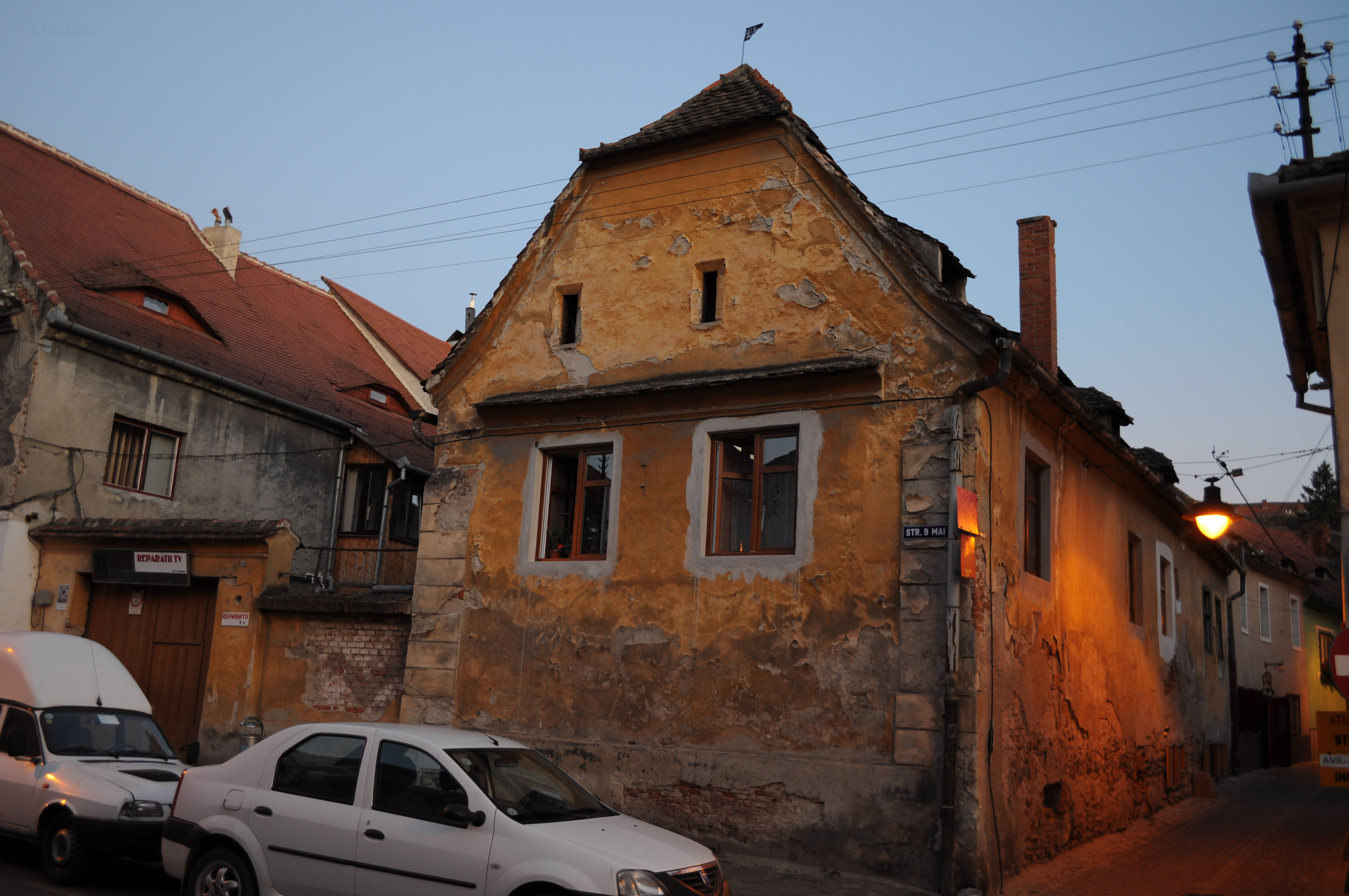 Casa, Str. 9 Mai 22, vedere frontal-dreapta